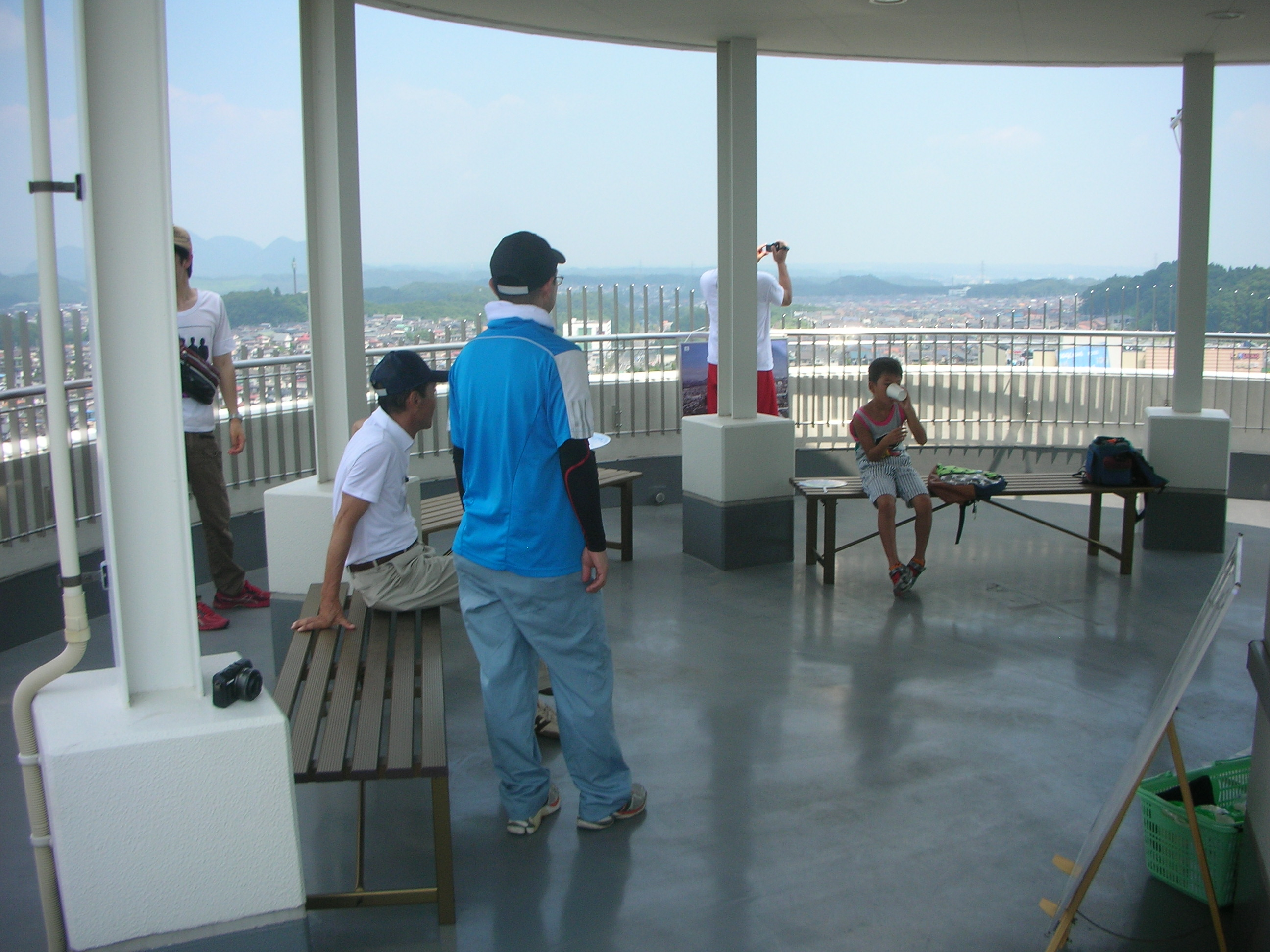 海抜130mの屋上部分